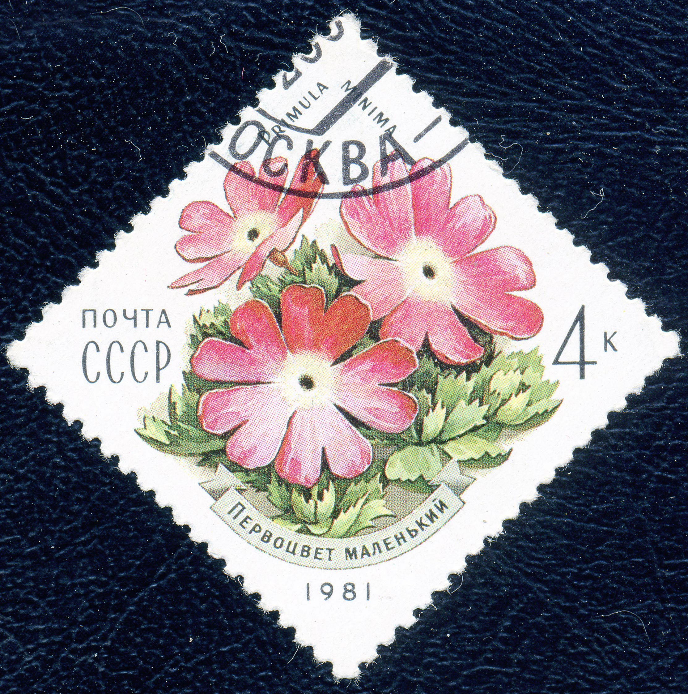 Почтовая марка СССР. 1981. Первоцвет маленький